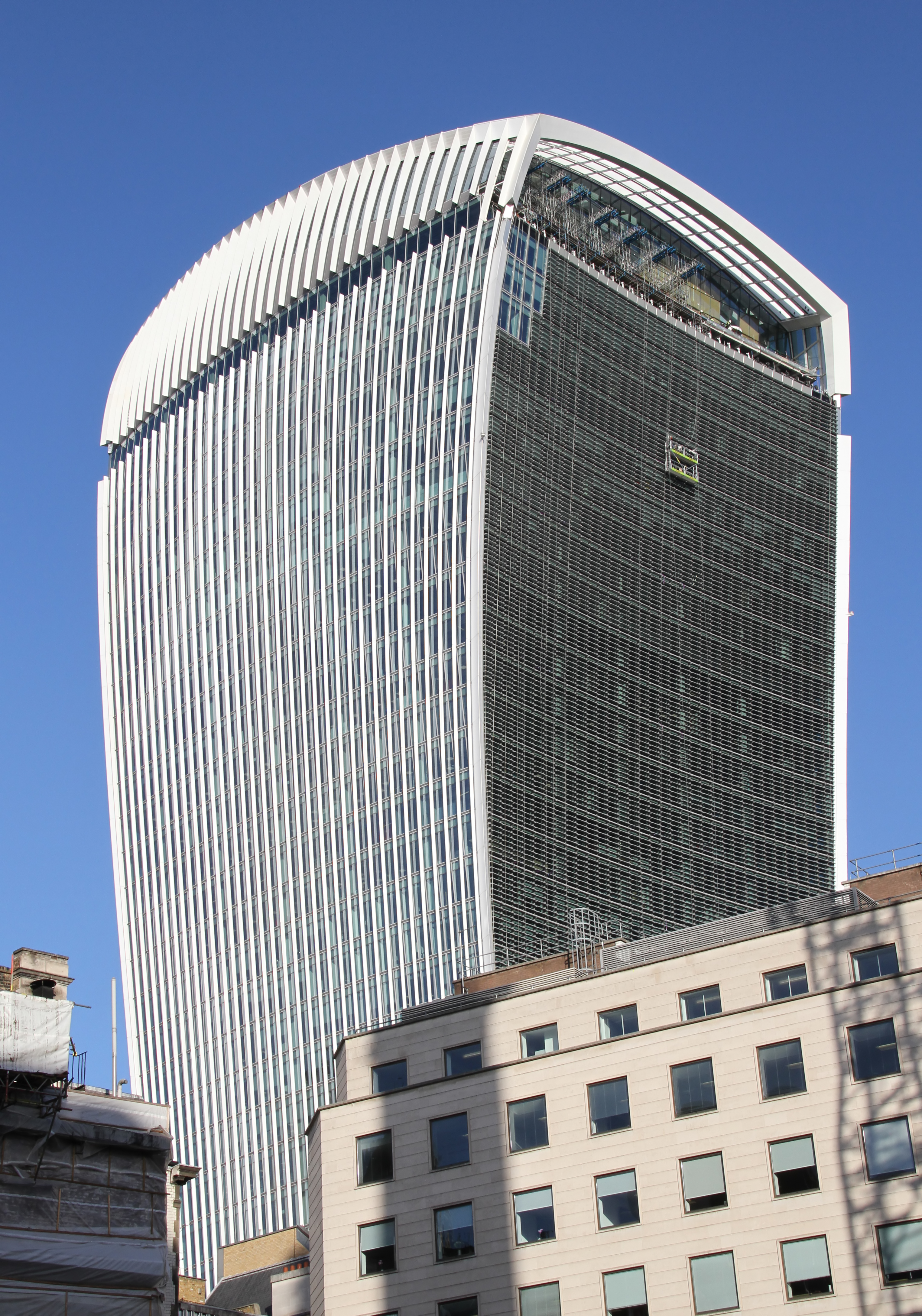 Walkie-Talkie Building 4